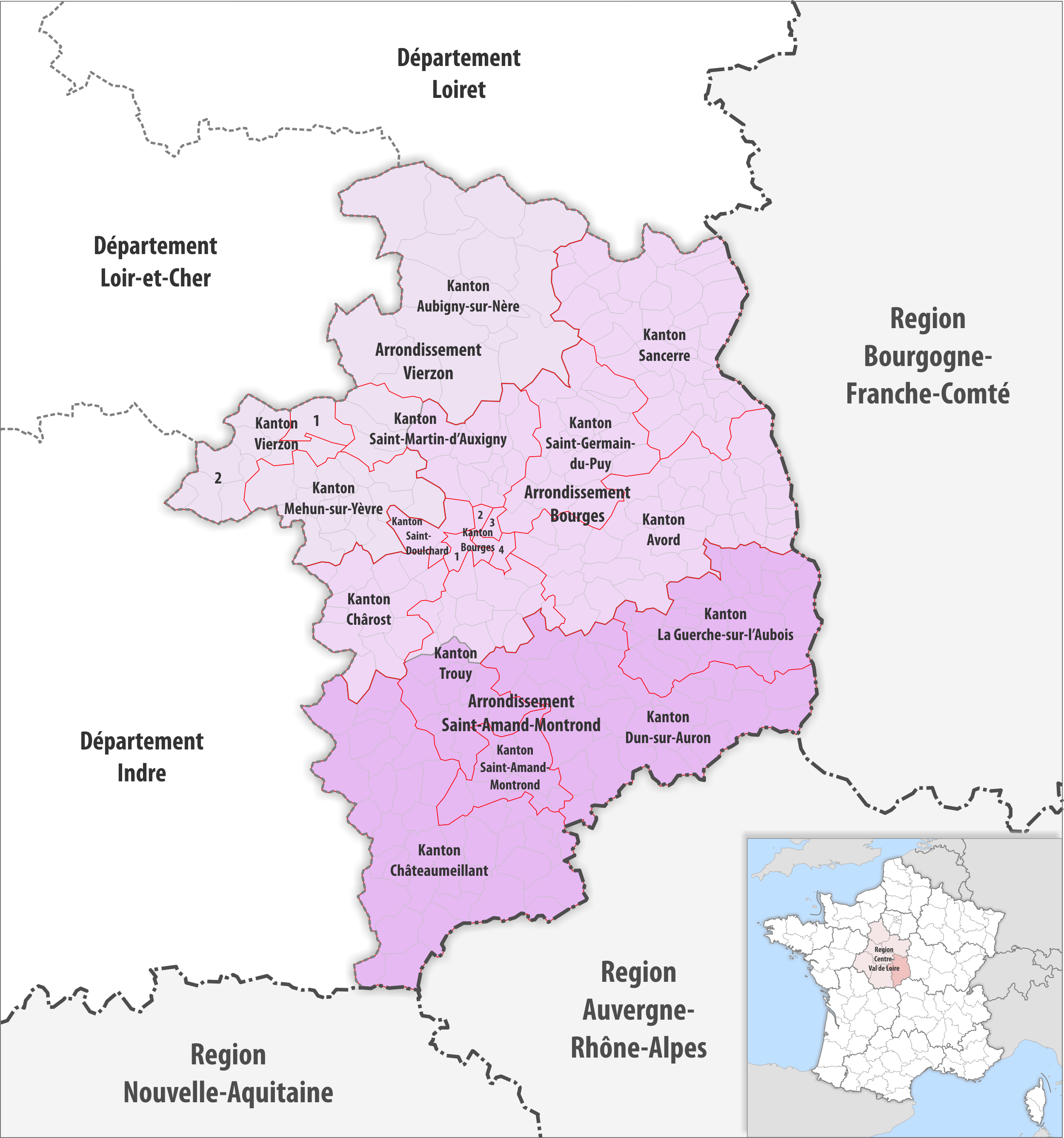 Gemeinden, Kantone und Arrondissemente im Departement Cher